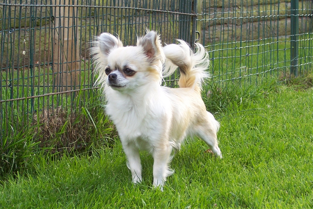 Divinidylle de Vindhyana Valley - Chihuahua Poil Long